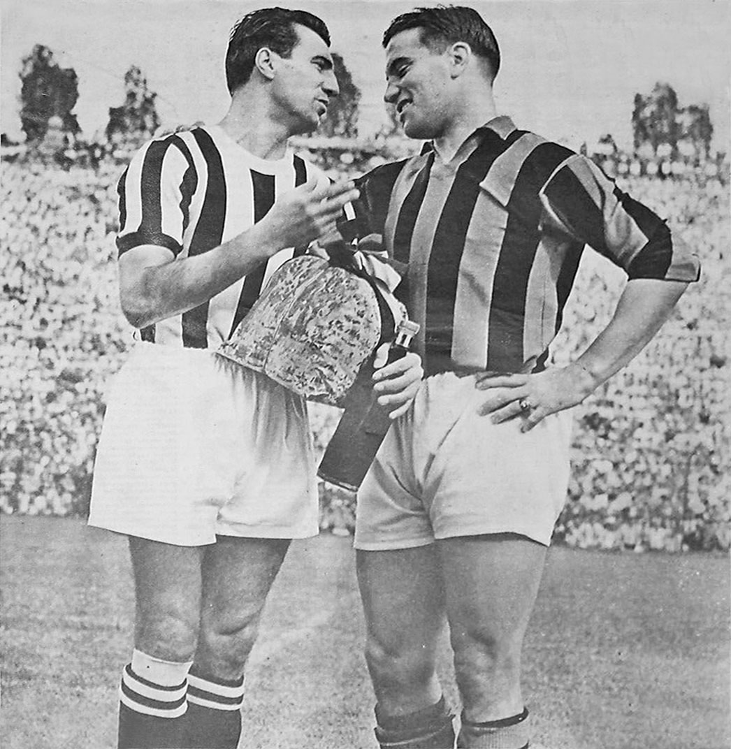 Milano (Italia), stadio San Siro, 3 settembre 1950. Da sinistra: il centromediano juventino Carlo Parola e il centravanti milanista Gunnar Nordahl s'intrattengono in occasione dell'amichevole tra A.C. Milan e Juventus F.C. (3-6). I due calciatori si riconciliano dopo la sfida di campionato del precedente 5 febbraio a Torino, vinta dagli ospiti con una storica goleada (7-1), e nella quale il solitamente pacato e corretto Parola era stato espulso per un fallo di frustrazione su Nordahl.